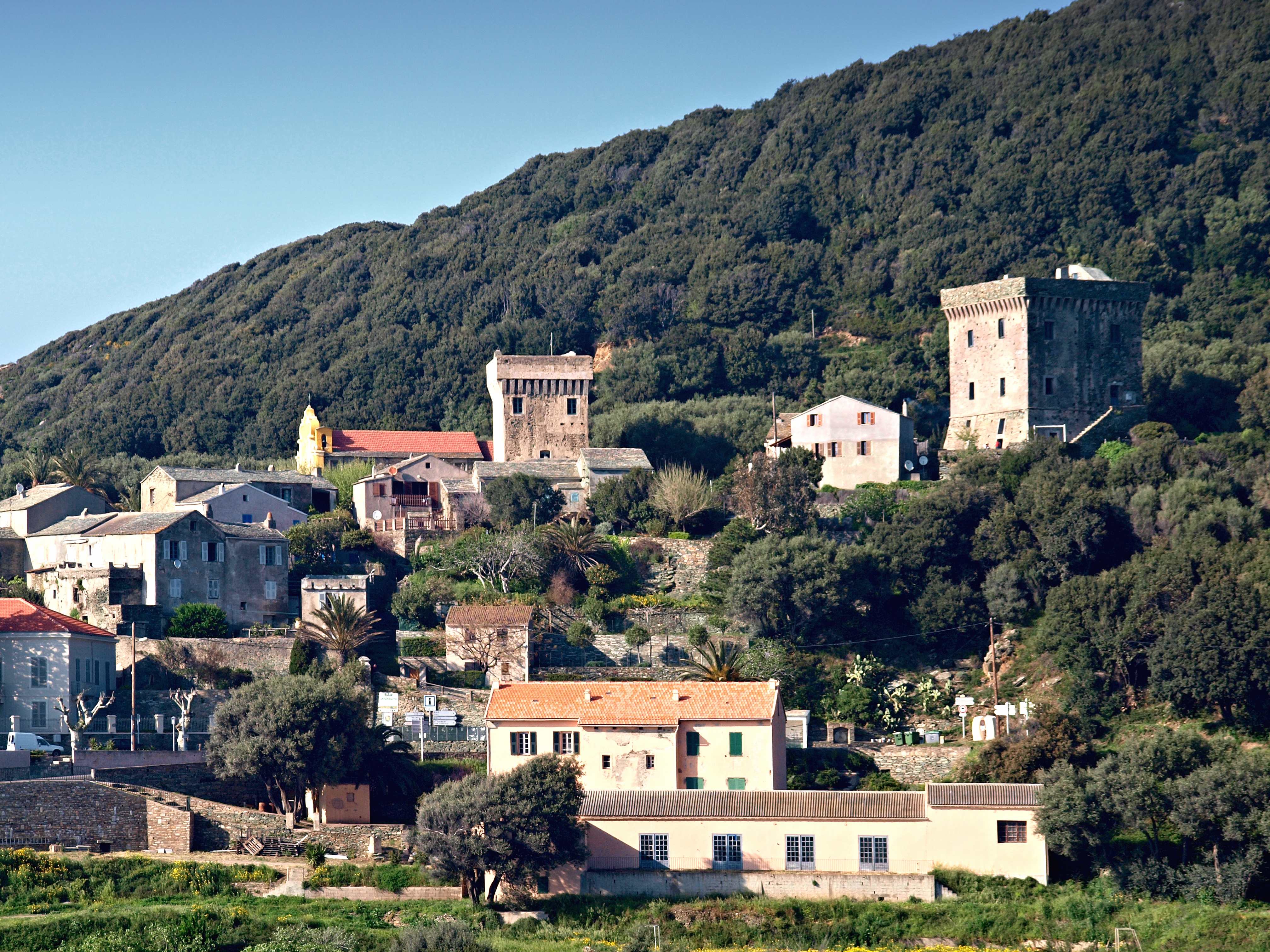 Morsiglia (Corsica) - Hameau de Pecorile